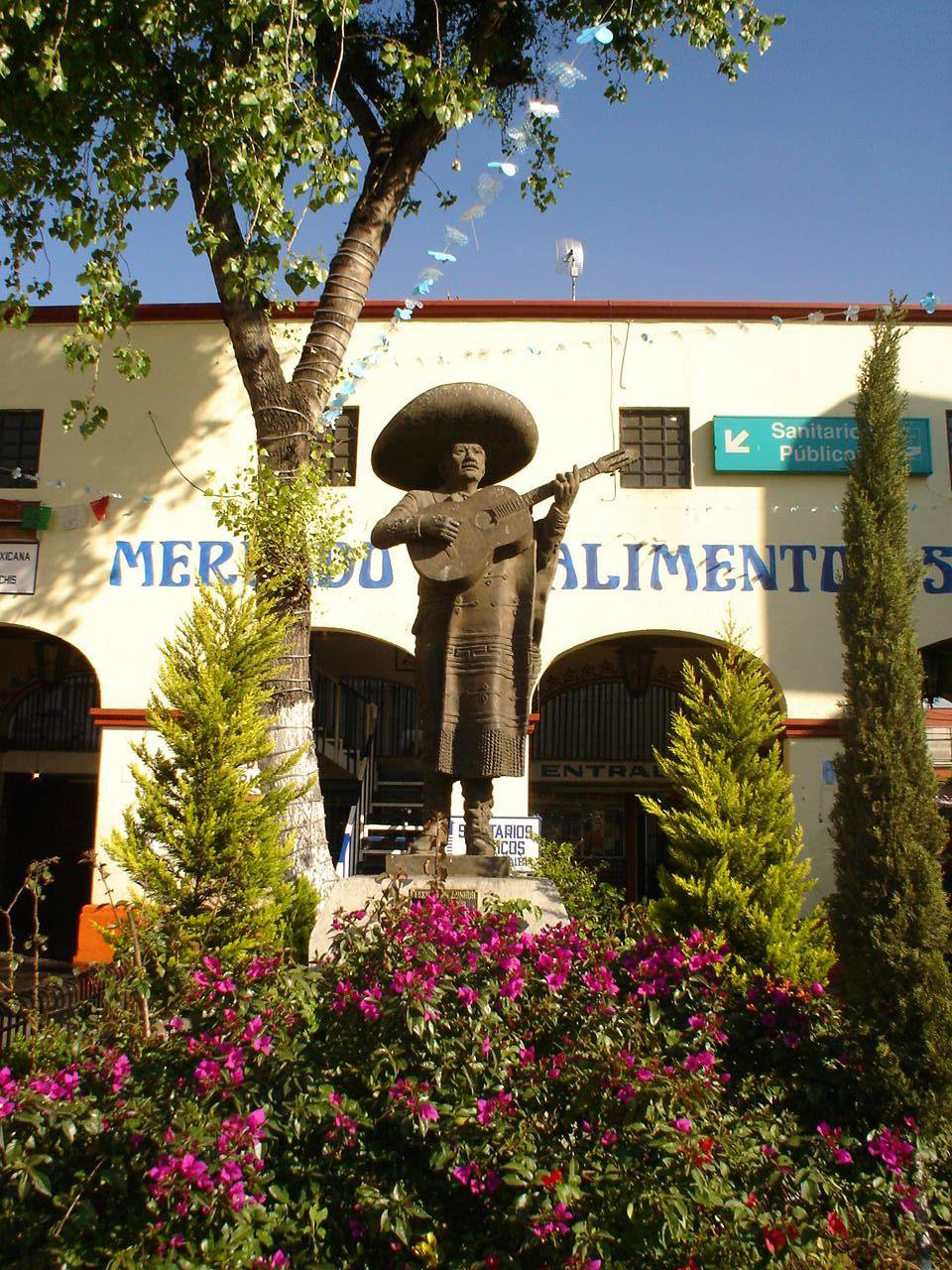 Monumento al Mariachi en Plaza Garibaldi, en la delegación Cuauhtémoc de la Ciudad de México, D.F., México.